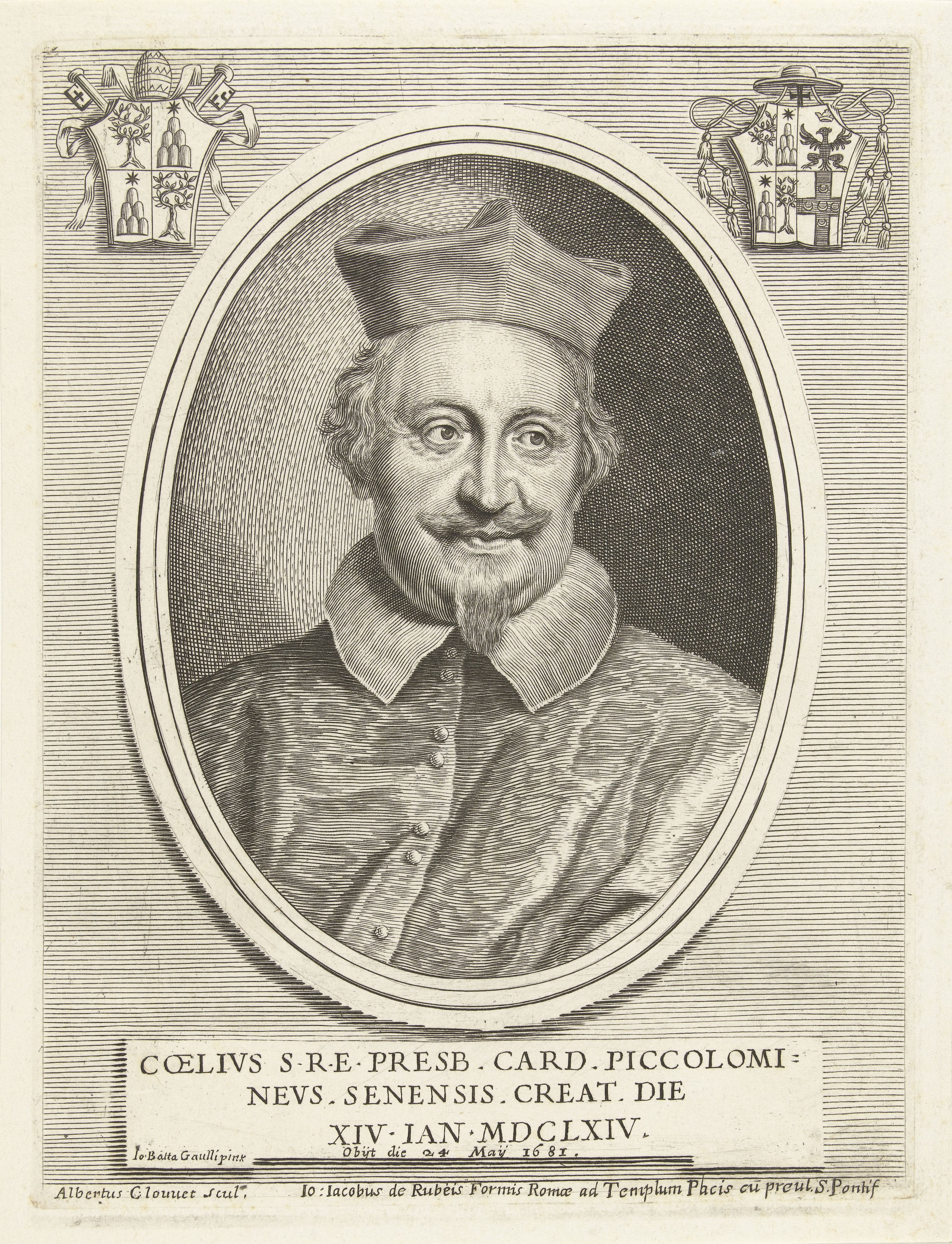 IdentificatieTitel(s): Portret van kardinaal Celio PiccolominiEffigies Cardinalium nunc viventium (serietitel)Objecttype: prent Objectnummer: RP-P-1909-4381Catalogusreferentie: Singer 72269Hollstein Dutch 8Opschriften / Merken: verzamelaarsmerk, verso midden, gestempeld: Lugt 2228Omschrijving: Portret in ovale lijst van kardinaal Celio Piccolomini. Buste naar rechts. Bovenaan links het wapen van paus Alexander VII, bovenaan rechts het wapen van Celio Piccolomini. De prent heeft een Latijns onderschrift met gegevens over de geportretteerde.VervaardigingVervaardiger: prentmaker: Albertus Clouwet (vermeld op object)naar schilderij van: Giovanni Battista Gaulli (vermeld op object)uitgever: Giovanni Giacomo de'Rossi (vermeld op object)Plaats vervaardiging: RomeDatering: 1664 - 1679 en/of na 1681Fysieke kenmerken: gravureMateriaal: papier Techniek: graveren (drukprocedé)Afmetingen: plaatrand: h 193 mm × b 147 mmToelichtingdeel van een serie met als titel "Effigies Cardinalium nunc viventum". De serie bestaat uit portretten van kardinalen.OnderwerpWie: Pasquale de AragonaVerwerving en rechtenVerwerving: aankoop 1905Copyright: Publiek domein